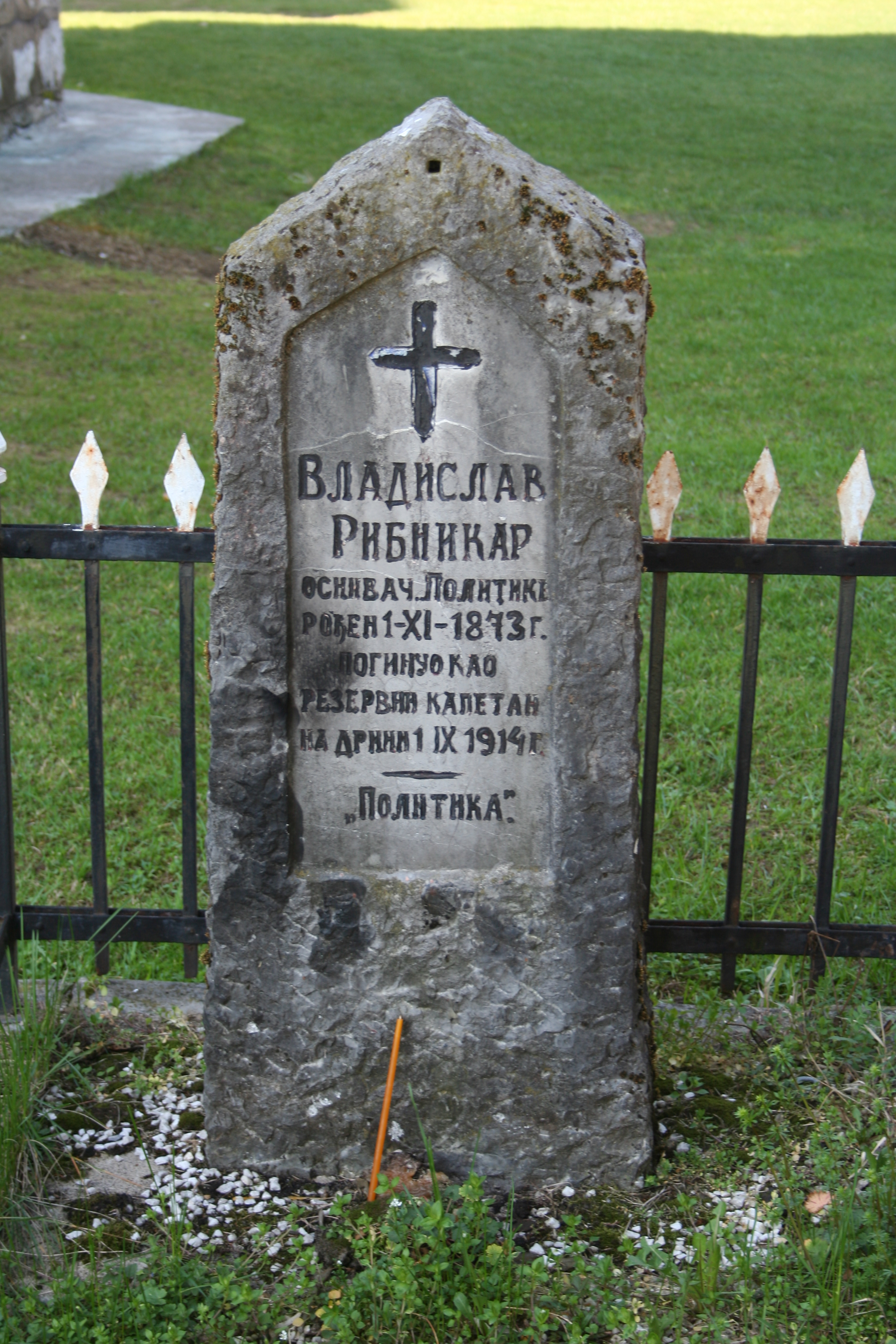 Spomen crkva i kosturnica Pecka